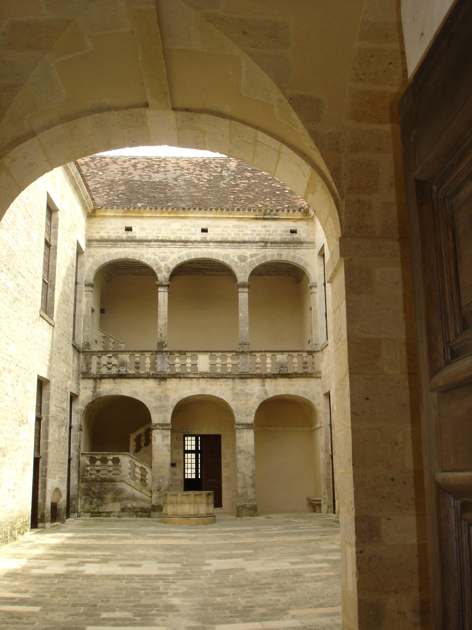 cour intérieure du château de duras lot et garonne